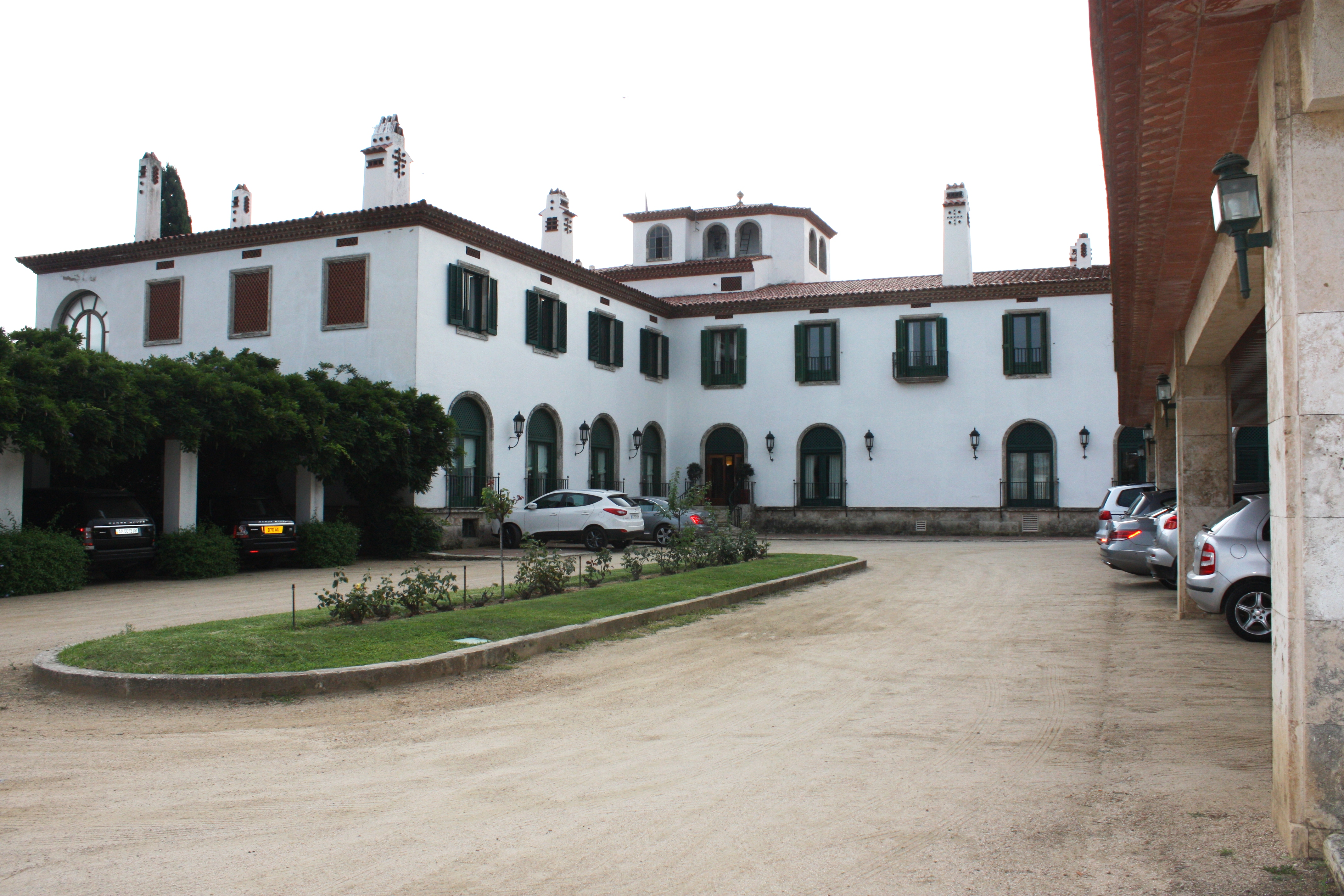 Façana de la plaça del Roserar de l'Hostal de la Gavina en S'Agaró